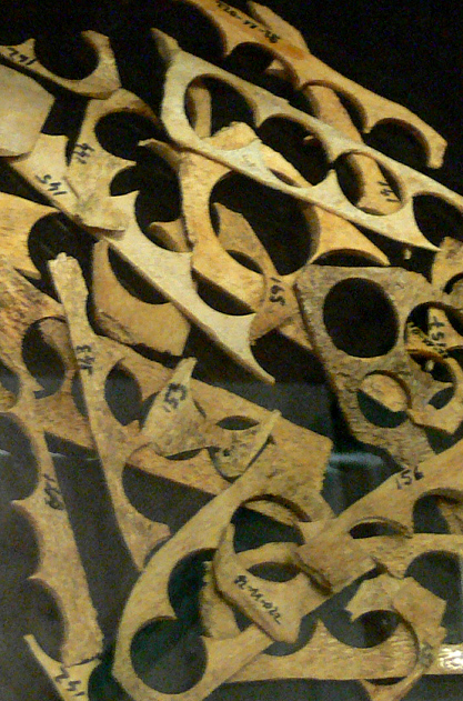 Biberach an der Riß, Braith-Mali-Museum Reste der Knopfherstellung (Knochenfragmente mit Stanzlöchern), Biberach 15. Jh.(Grabung Radgasse 8, 1991; Leihgabe des Landesdenkmalamts Baden-Württemberg)